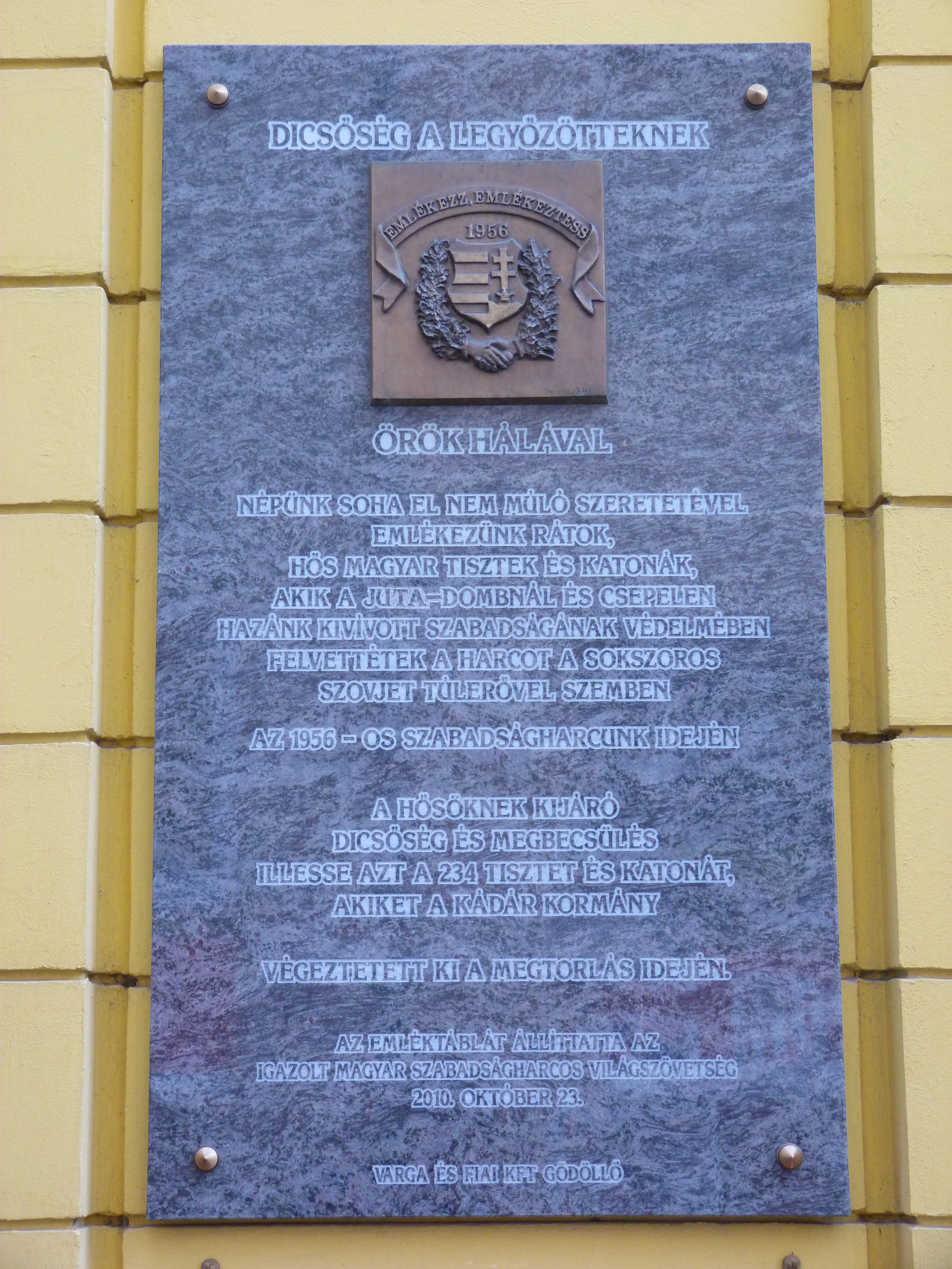 A felvétel 2012. december 5 -én készült Budapesten, a Józsefvárosban. Corvin köz. ©© Published under Creative Commons in the Metapolisz DVD line. All of the photos and vids in the Metapolisz DVD line are under Creative Commons and can be used even for commercial – for profit – purposes. Recommended Citation Derzsi Elekes Andor: Metapolisz DVD line ©© Megjelent Creative Commons alatt a Metapolisz sorozatban. A Metapolisz sorozat valamennyi képe és filmje Creative Commons alatti valamint kereskedelmi - for profit - célra is felhasználható. Ajánlott hivatkozás: Derzsi Elekes Andor: Metapolisz DVD line Másik fénykép ugyanerről a tábláról: File:Budapest-corvin-juta-domb.jpg